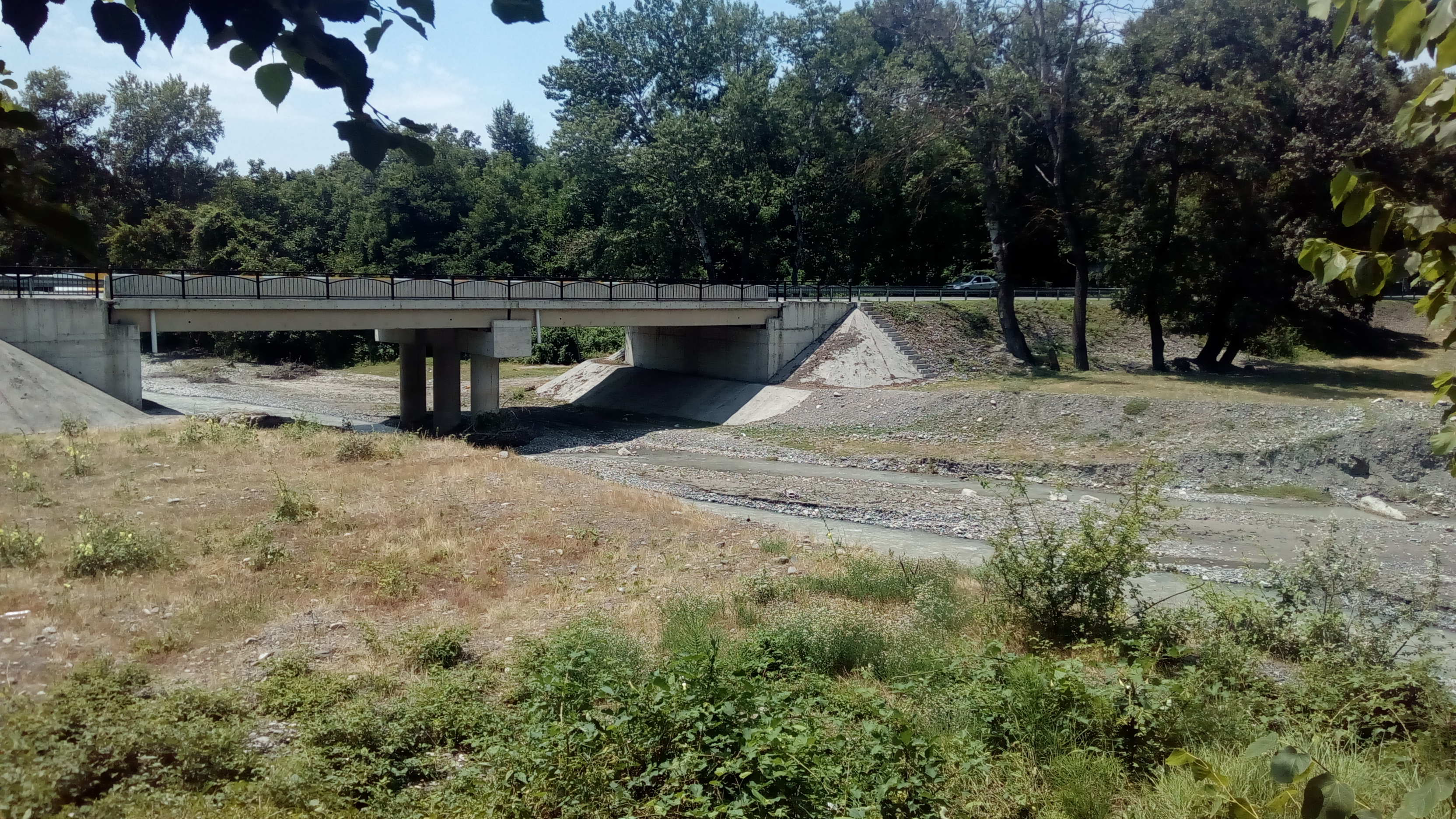 Oğuz rayonu